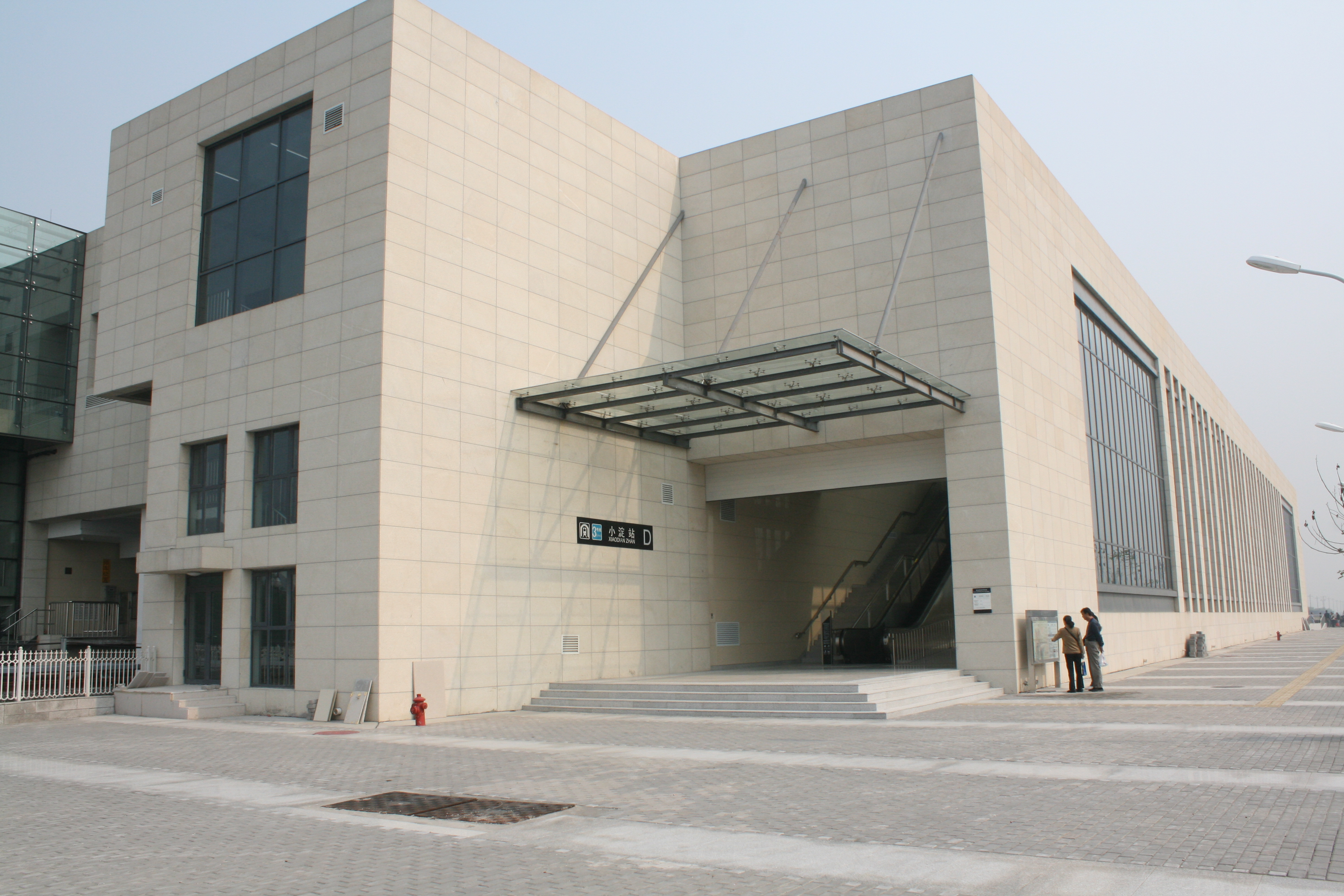 天津地鐵三號線小淀站體 0001